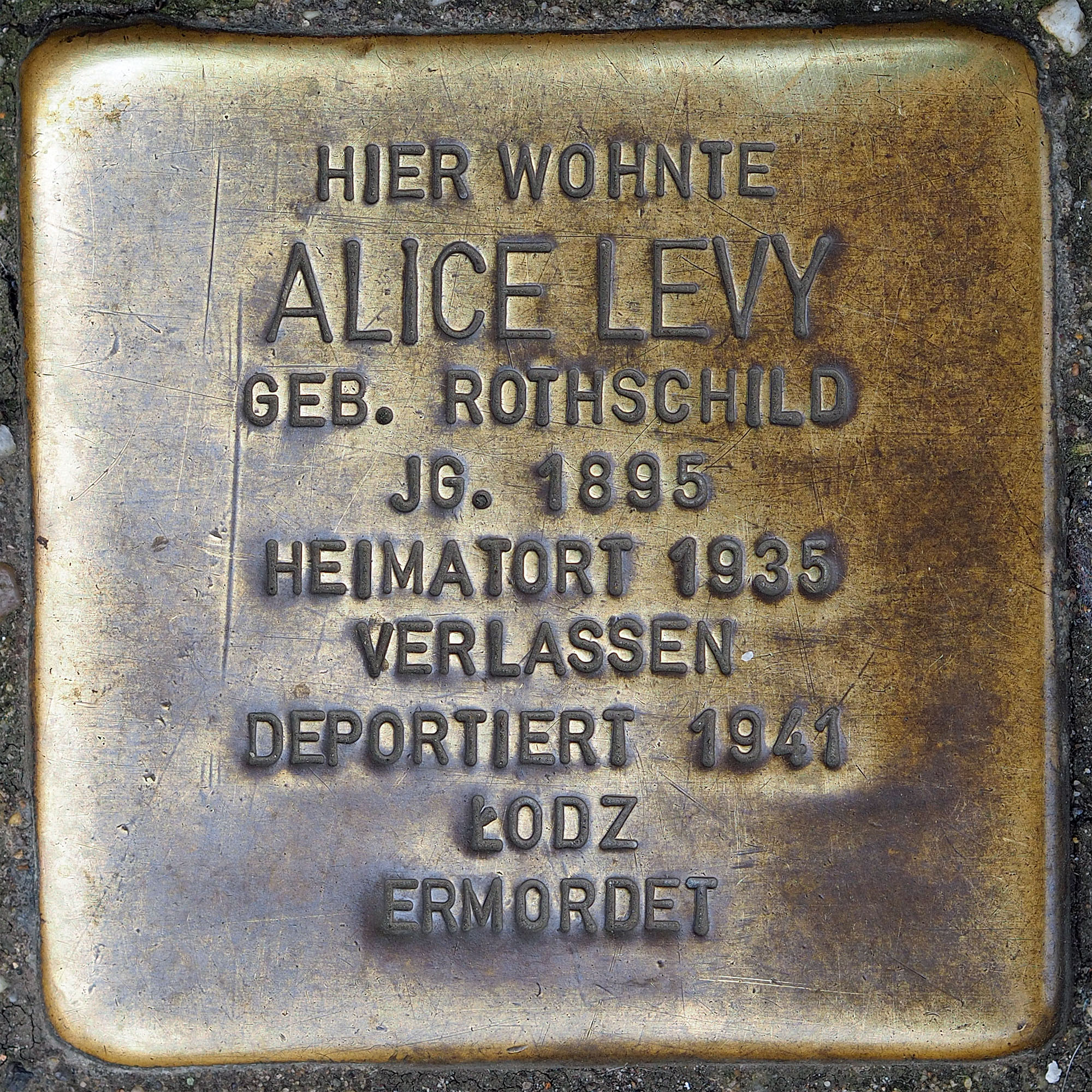 Stolpersteine GV: Lewy, Alice